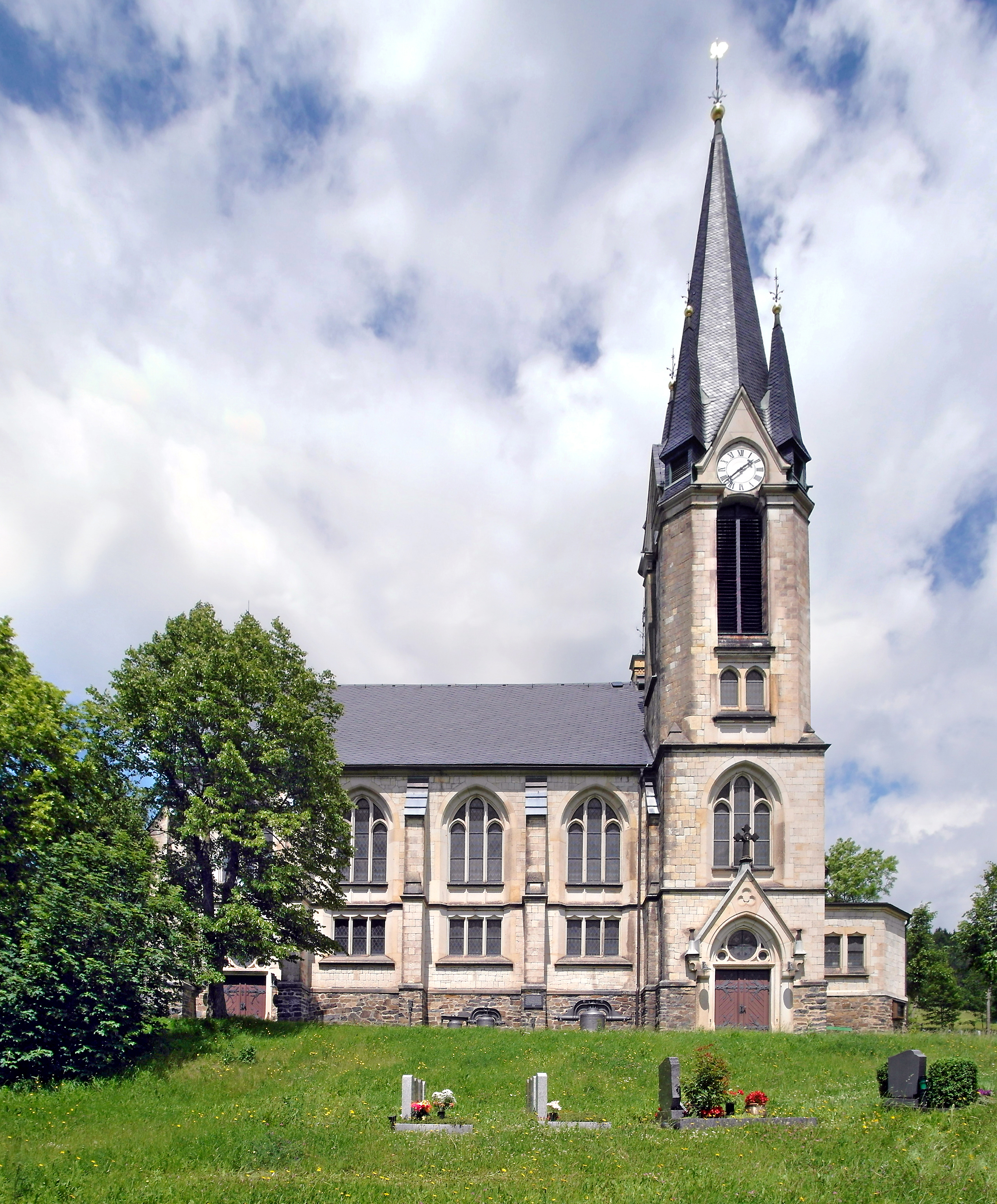 17.06.2017 09623 Rechenberg (Rechenberg-Bienenmühle): Kirche Rechenberg (GMP: 50.737365,13.555675). An der Schanze 4 Von 1899 bis 1901 entstand die neue Pfarrkirche im neogotischen Baustil nach Plänen von Kirchenbaumeister Theodor Quentin aus Pirna. Bauausführung durch die Baufirma Schäfer aus Copitz bei Pirna. 2010 bis 2012 wurde das Kirchenschiff restauriert. [SAM0445-0446.JPG]20170617255MDR.JPG(c)Blobelt